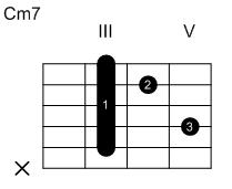 Eigenanfertigung